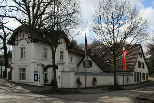 Denkmal Nr. 6 in Viersen